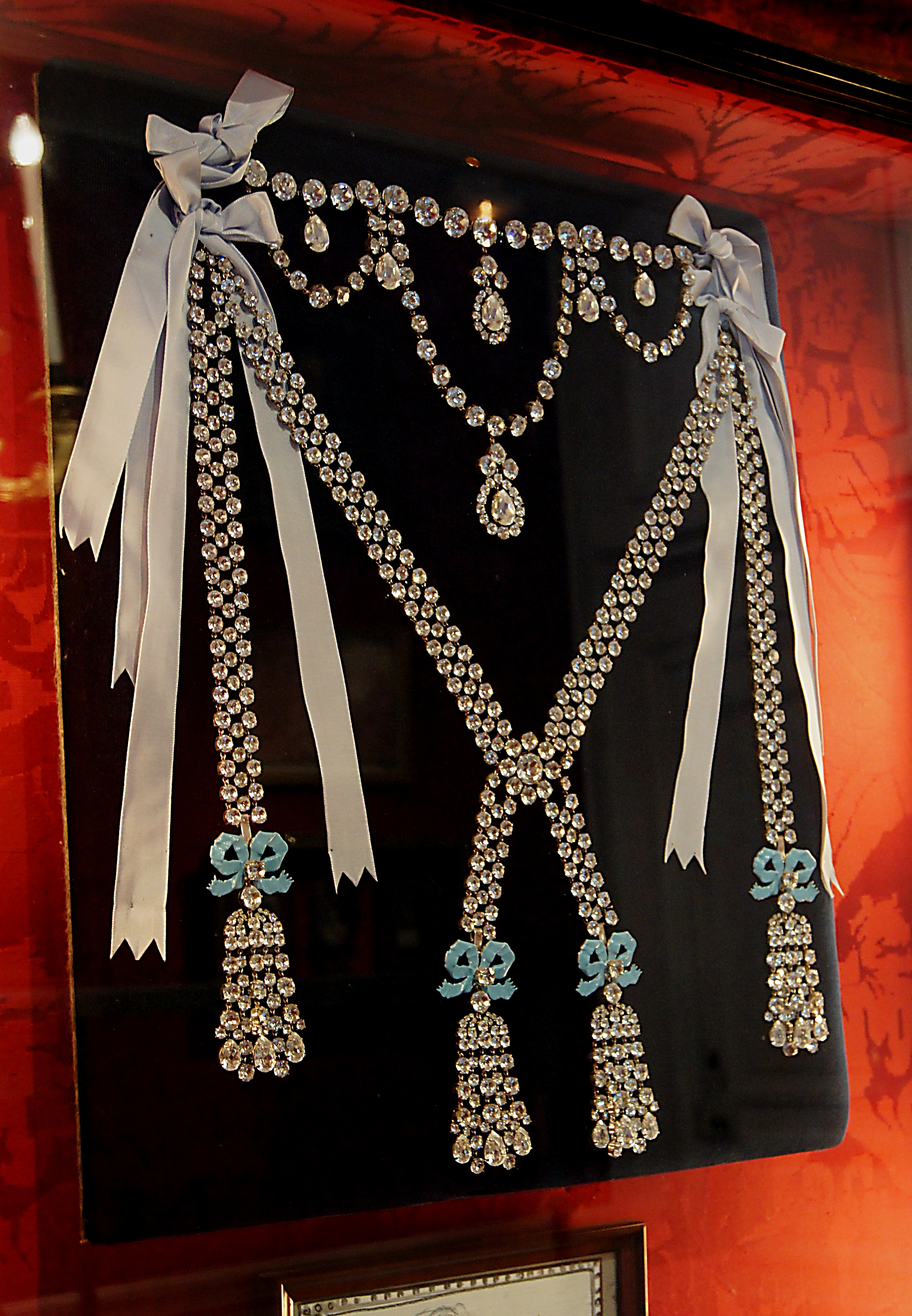 "The Queen's necklace", reconstruction, Château de Breteuil, France